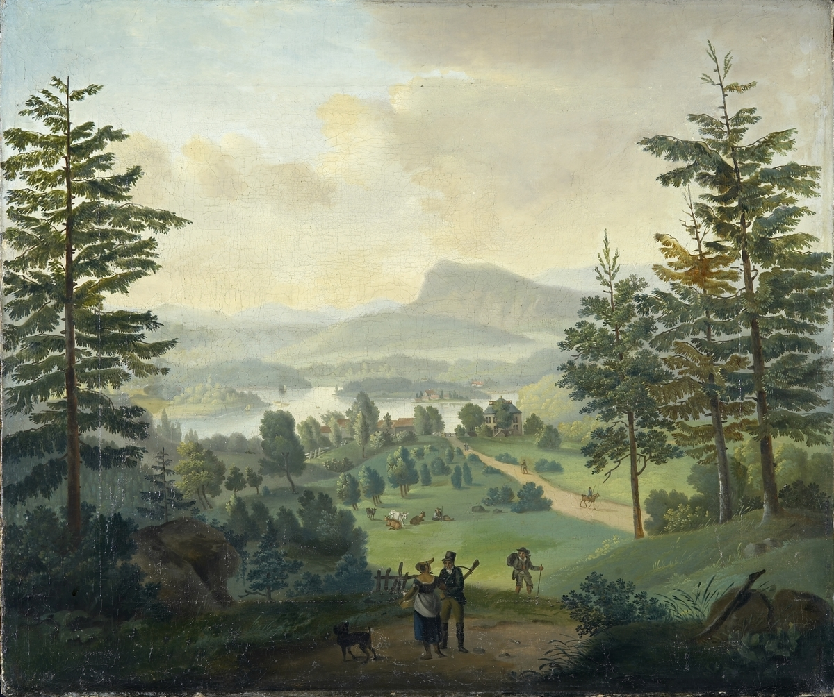 Høvik gård sett fra nordøst. I forgrunnen en jeger med gevær på ryggen sammen med en kvinne med kurv på armen. Til venstre for dem en hund. Like bak dem kommer en mann med stav i hånden og skreppe på ryggen. På gressgangene nedenfor ligger en gjeter med 4 kuer ved siden av. Midt i bildet, nede ved vannet, ligger Høvik gård. Hovedbygningen har rekkverk rundt takten. I bakgrunnen Skaugumsåsen. Avbildet person Marcus Pløen (usikker)